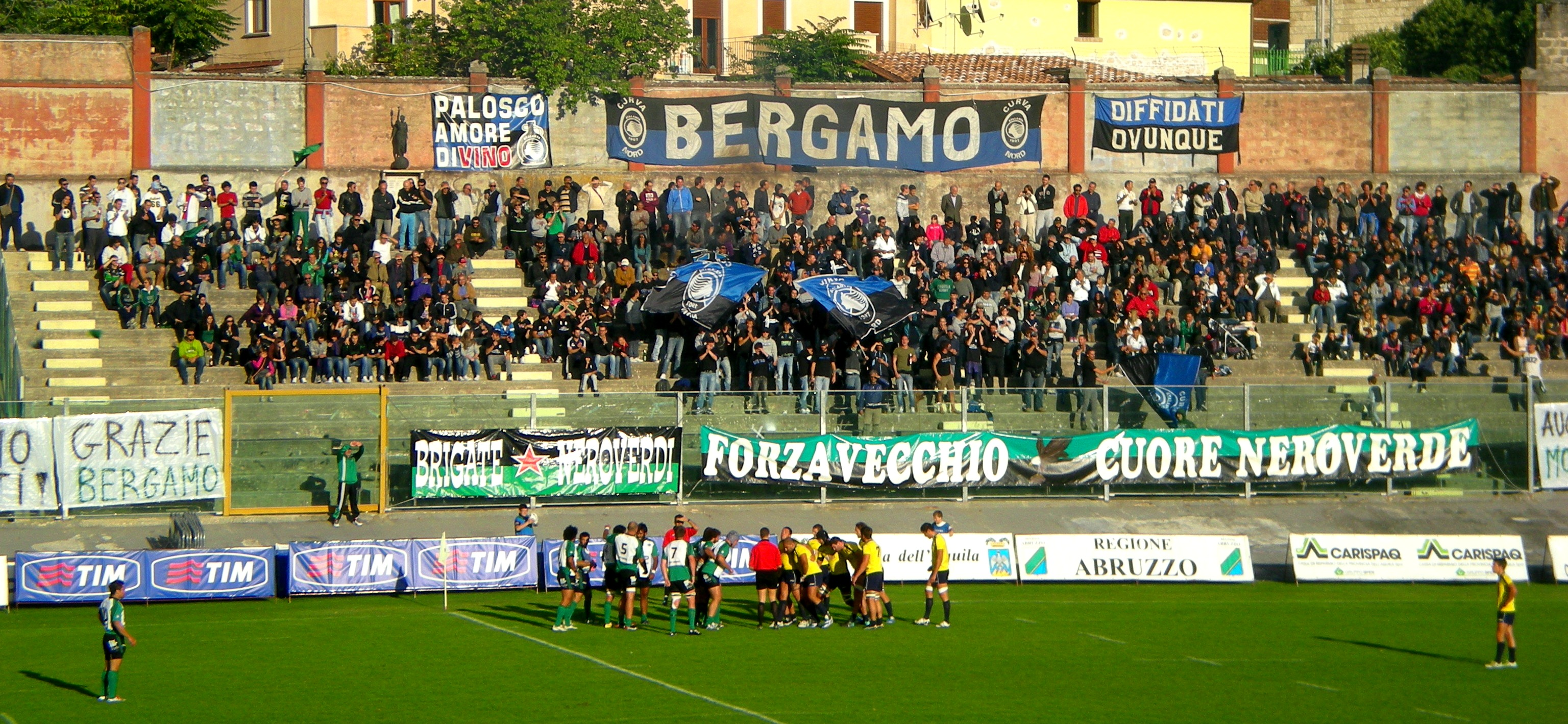 Incontro di rugby L'Aquila-Crociati Parma valido per la 1° giornata del campionato di Eccellenza 2011-2012. Particolare del settore Distinti dello stadio Tommaso Fattori con la tifoseria dell'Atalanta Bergamasco Calcio, gemellata con L'Aquila Rugby.